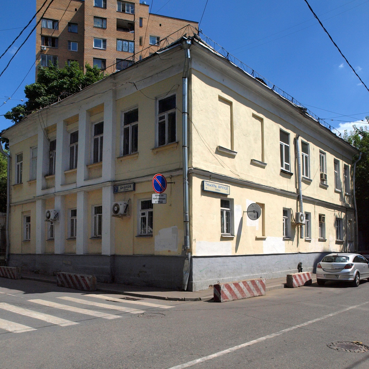 Москва. Улица Тимура Фрунзе.